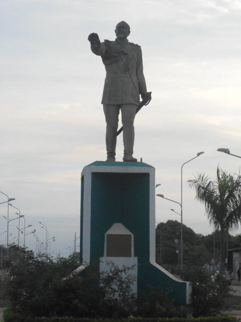 Monumento al MY. Gral. José Manuel Pando This medium shows the protected monument with the number N/00-003 in Bolivia.